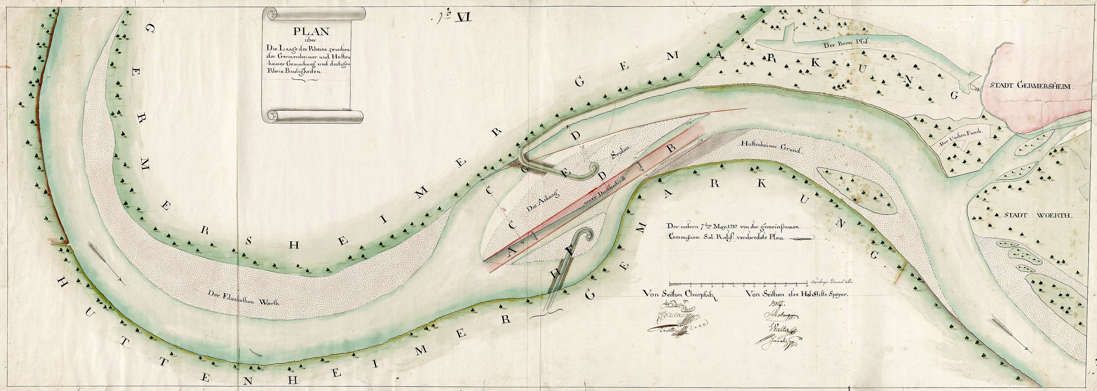 H Gemarkungspläne Badische Orte H Huttenheim, Stadt Philippsburg, KA Plan über die Laage des Rheins zwischen der Germersheimer und Huttenheimer Gemarkung und dortigen Rhein-Bauligkeiten